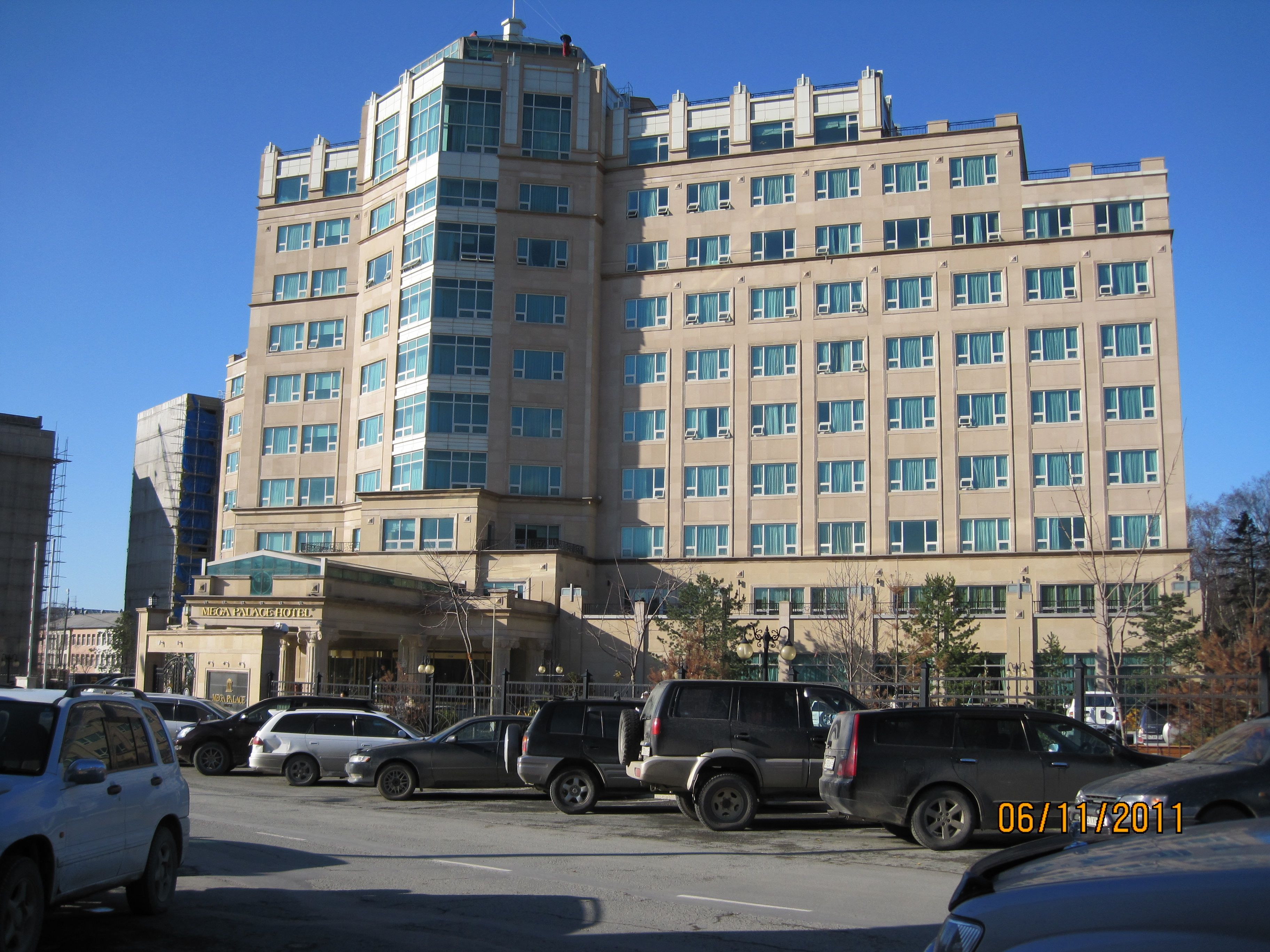 Отель "Мегапалас" в Южно-Сахалинске. В нём останавливался Д. Медеведев